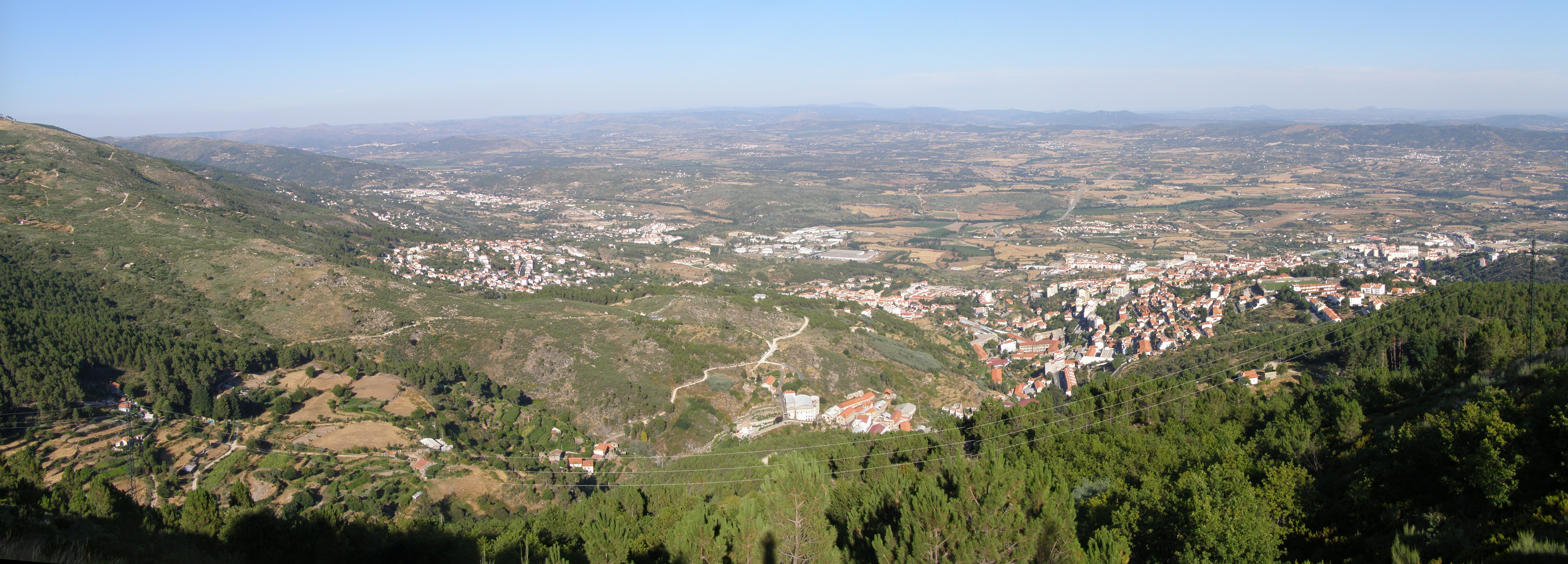 Panorama en surplomb de la ville de Covilhã au Portugal. On peut voir la ville de Belmonte à gauche de la photo, sur sa colline. Sont également visibles des éoliennes dans le fond, sur les collines, vers l'Espagne.